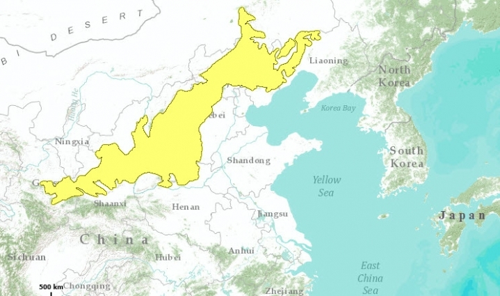 Mappa Ecoregione PA0411 - Foreste miste dell'altopiano del Loess della Cina centrale